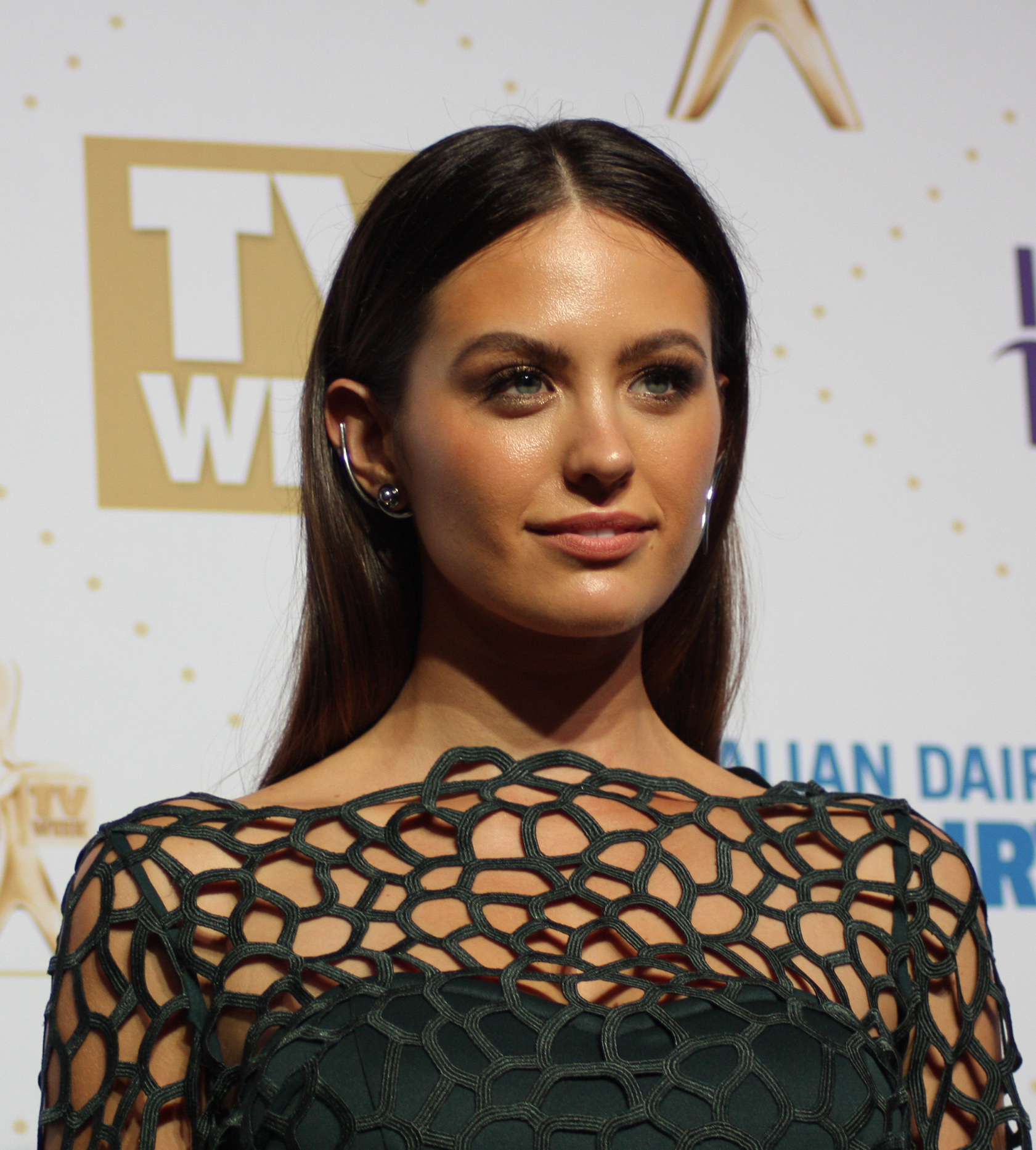 jesinta campbell